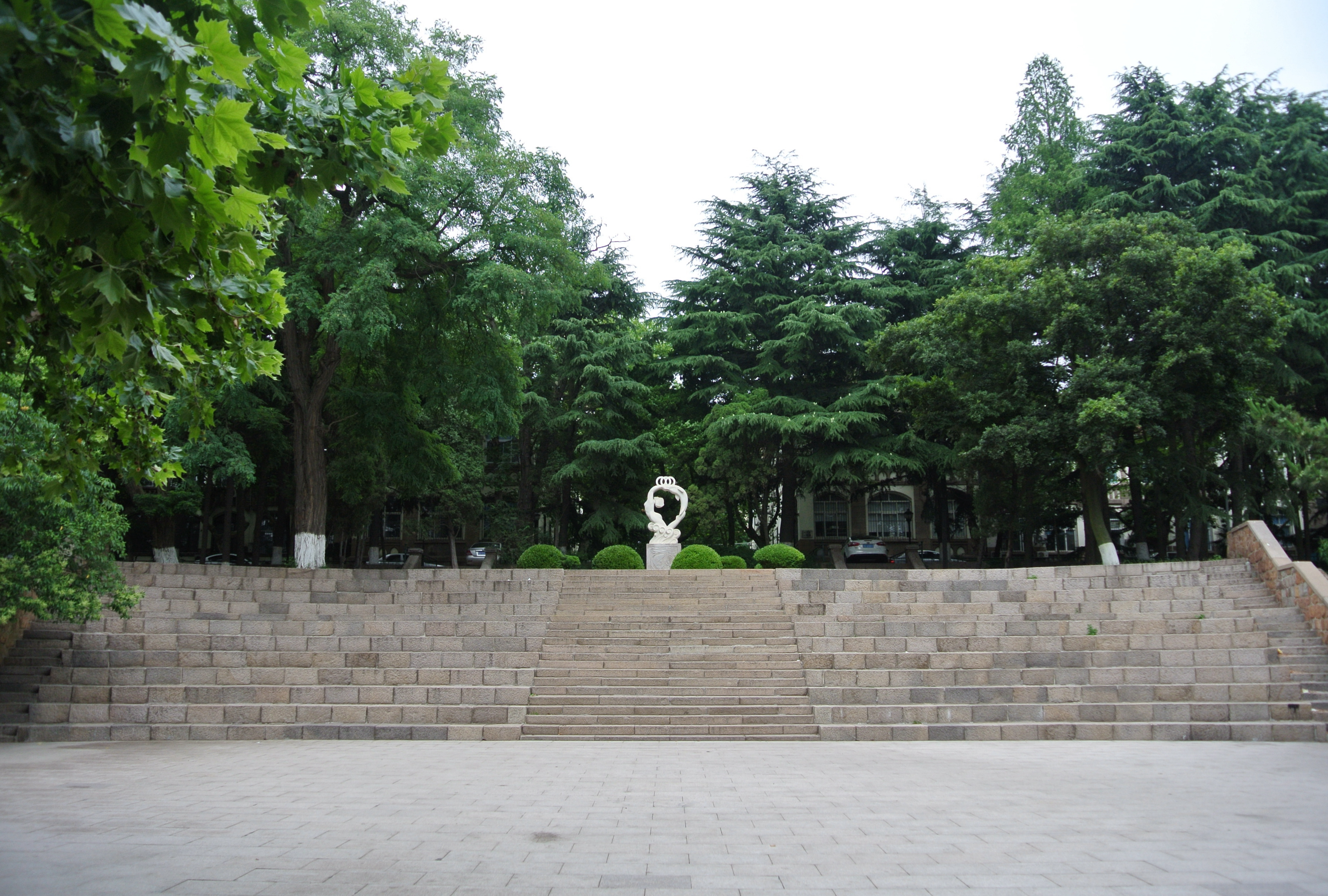 青岛海大鱼山校区广场